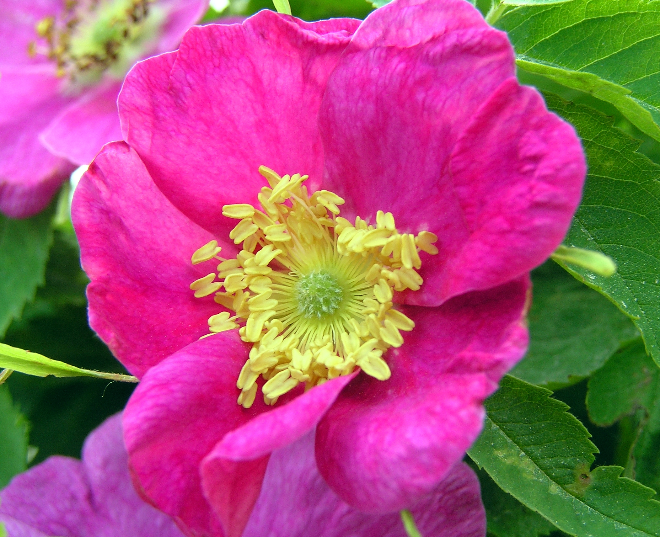 Mets-kibuvitsa ois tolmukatega.